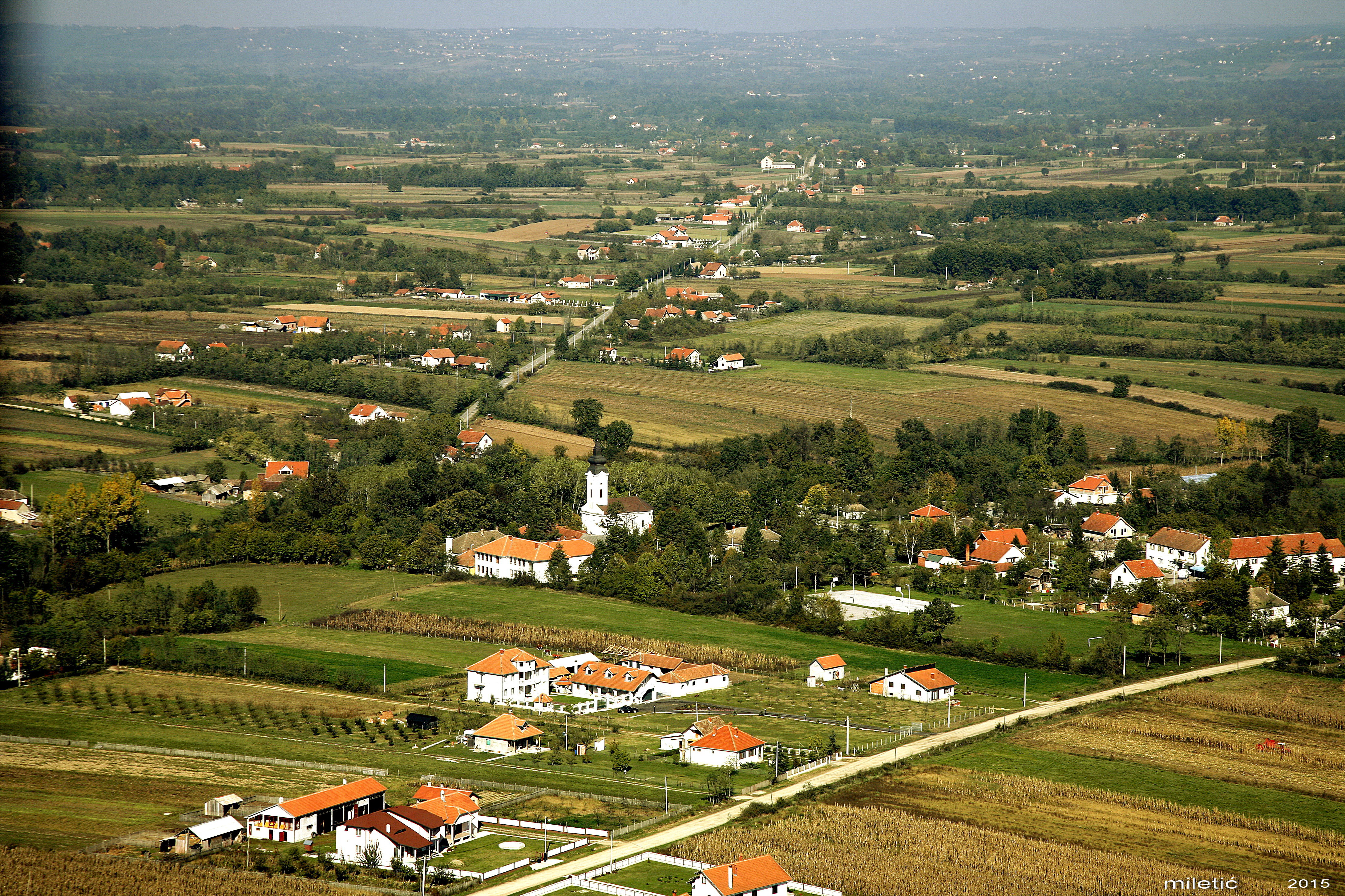 Центар Радљева